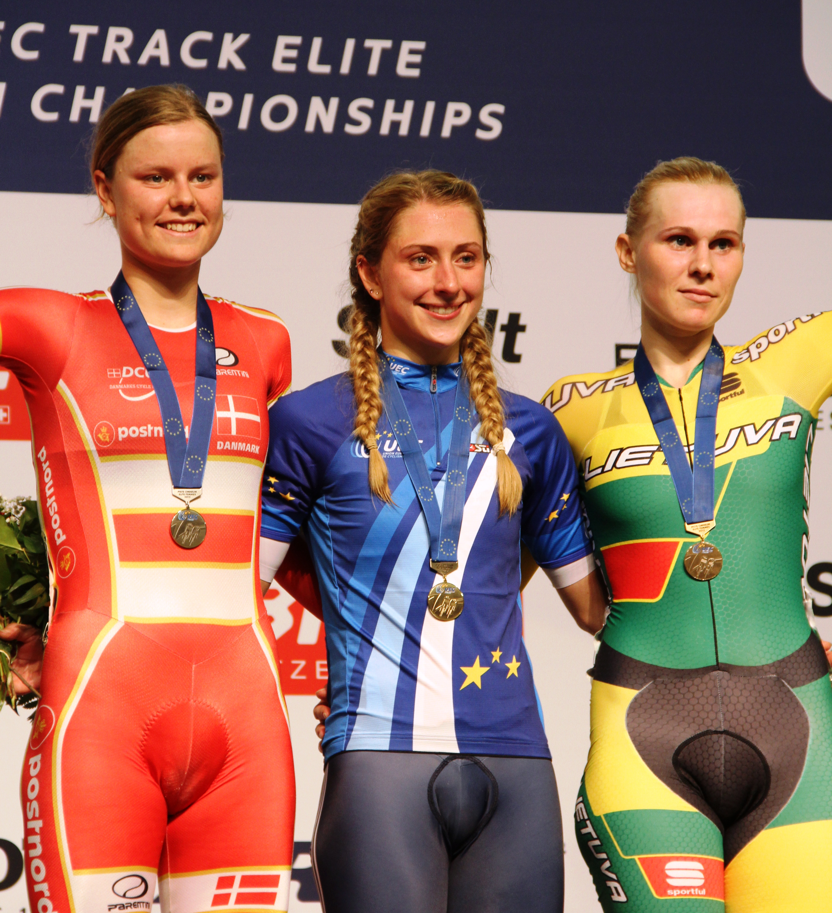 Podium im Omnium der Frauen: (v.l.n.r.): Amalie Dideriksen, Laura Trott, Aušrinė Trebaitė The making of this document was supported by the Community-Budget of Wikimedia Germany.